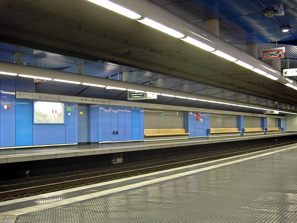 Stadtbahnstation Plittersdorfer Straße in Bonn-Bad Godesberg